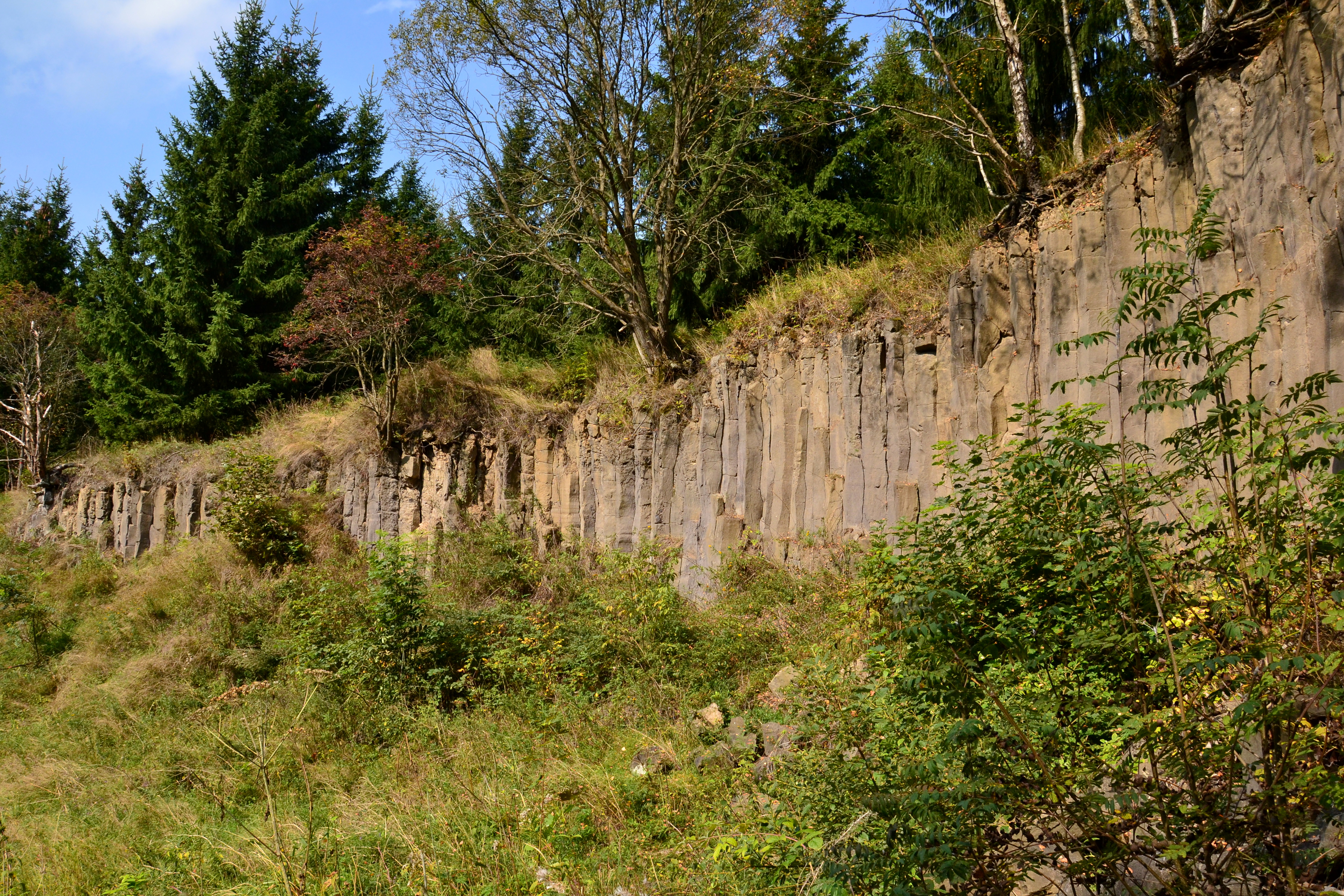 Celkový pohled